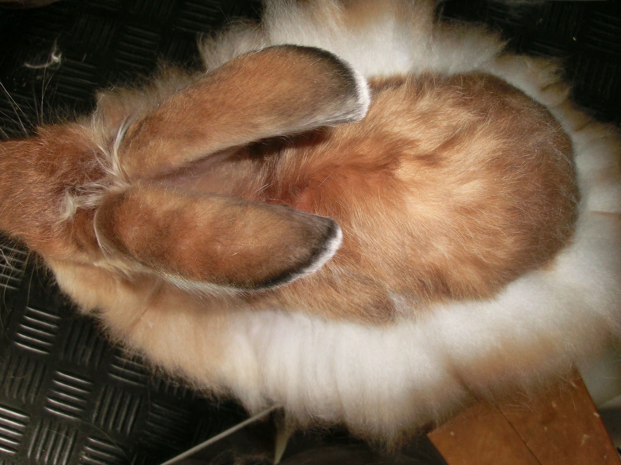 Vom Rücken aus gepflücktes Satinangorakaninchen